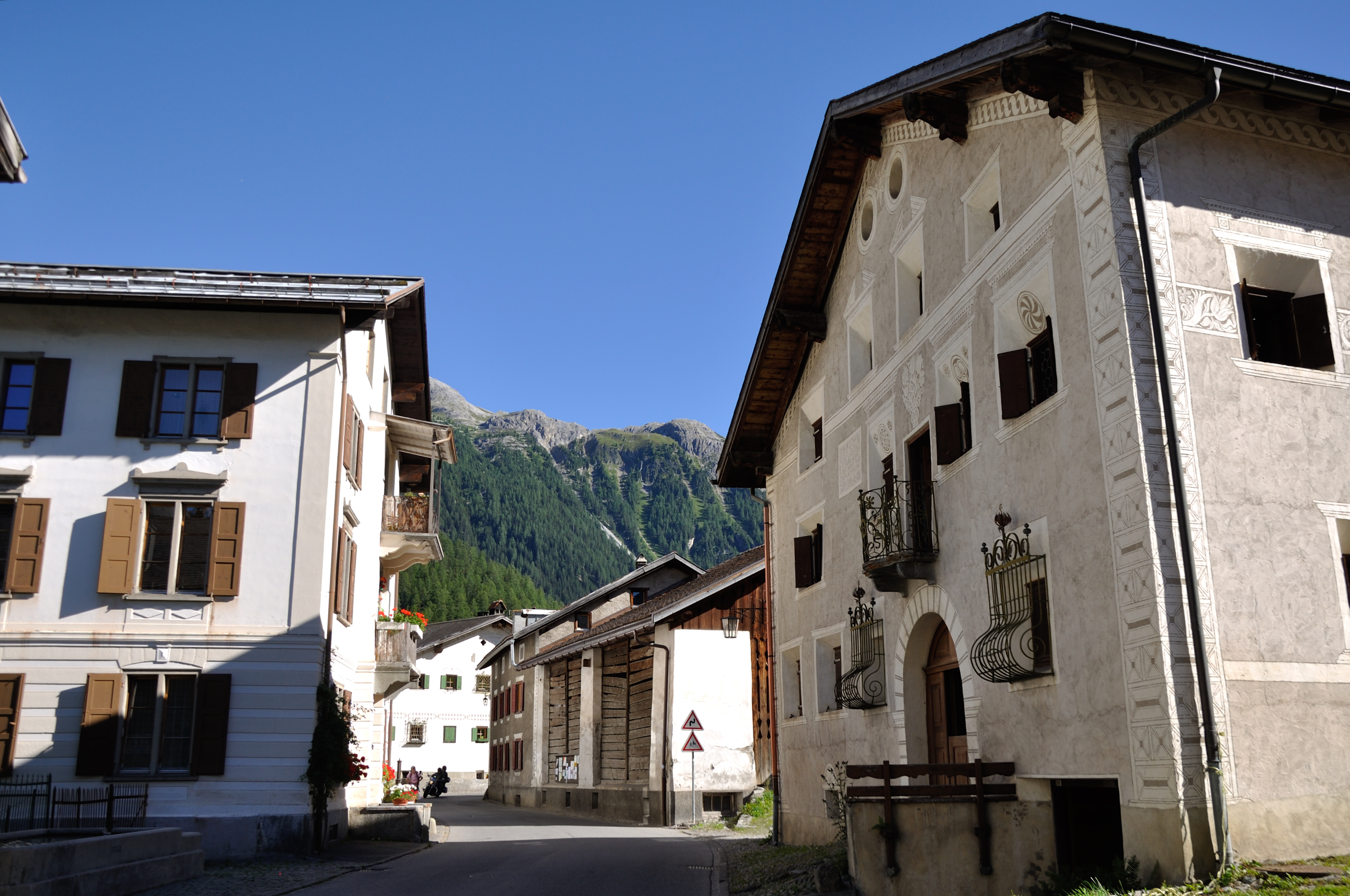 Switzerland, Graubünden, views in Bergün.